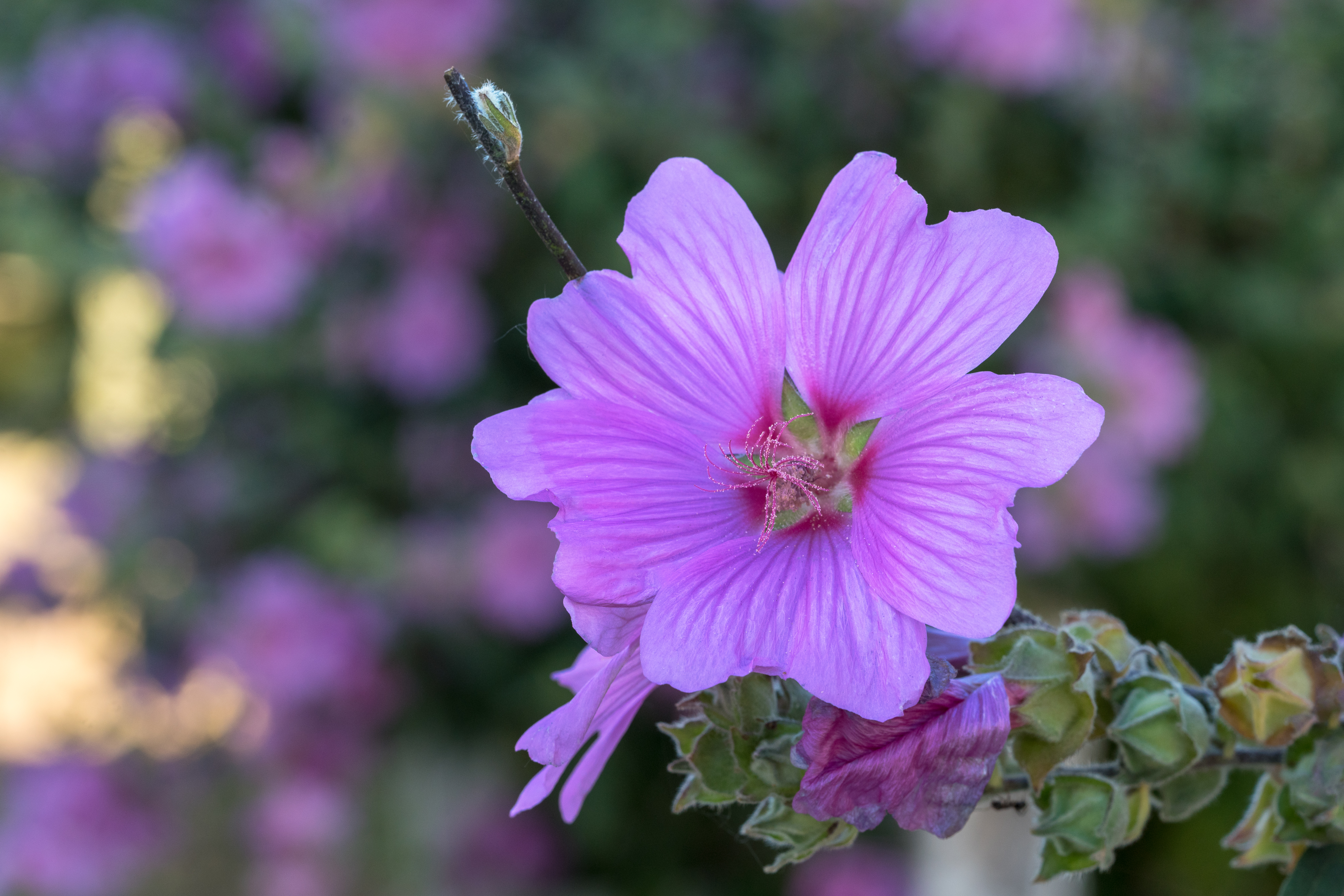 Lavatère d'Hyères Famille : Malvaceae Genre : Malva L. Espèce : Malva olbia (L.) Alef.